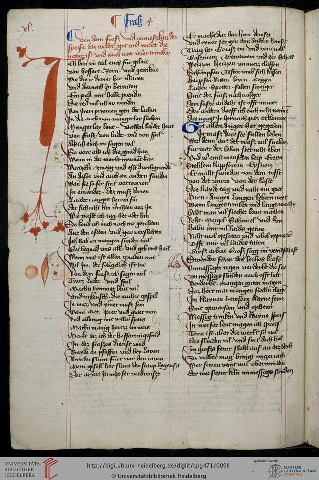 Hugo von Trimberg "Der Renner"